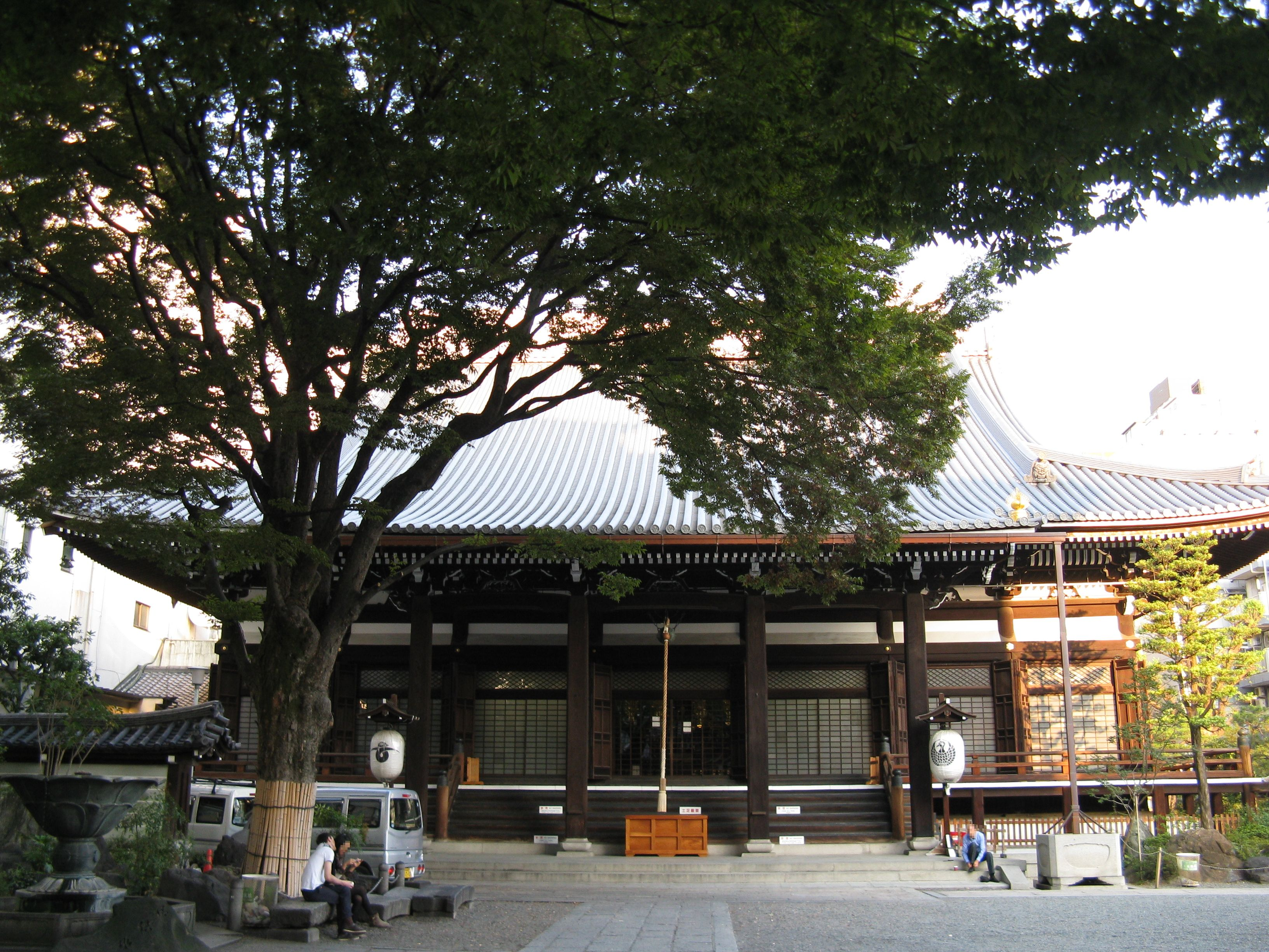 本能寺 本堂